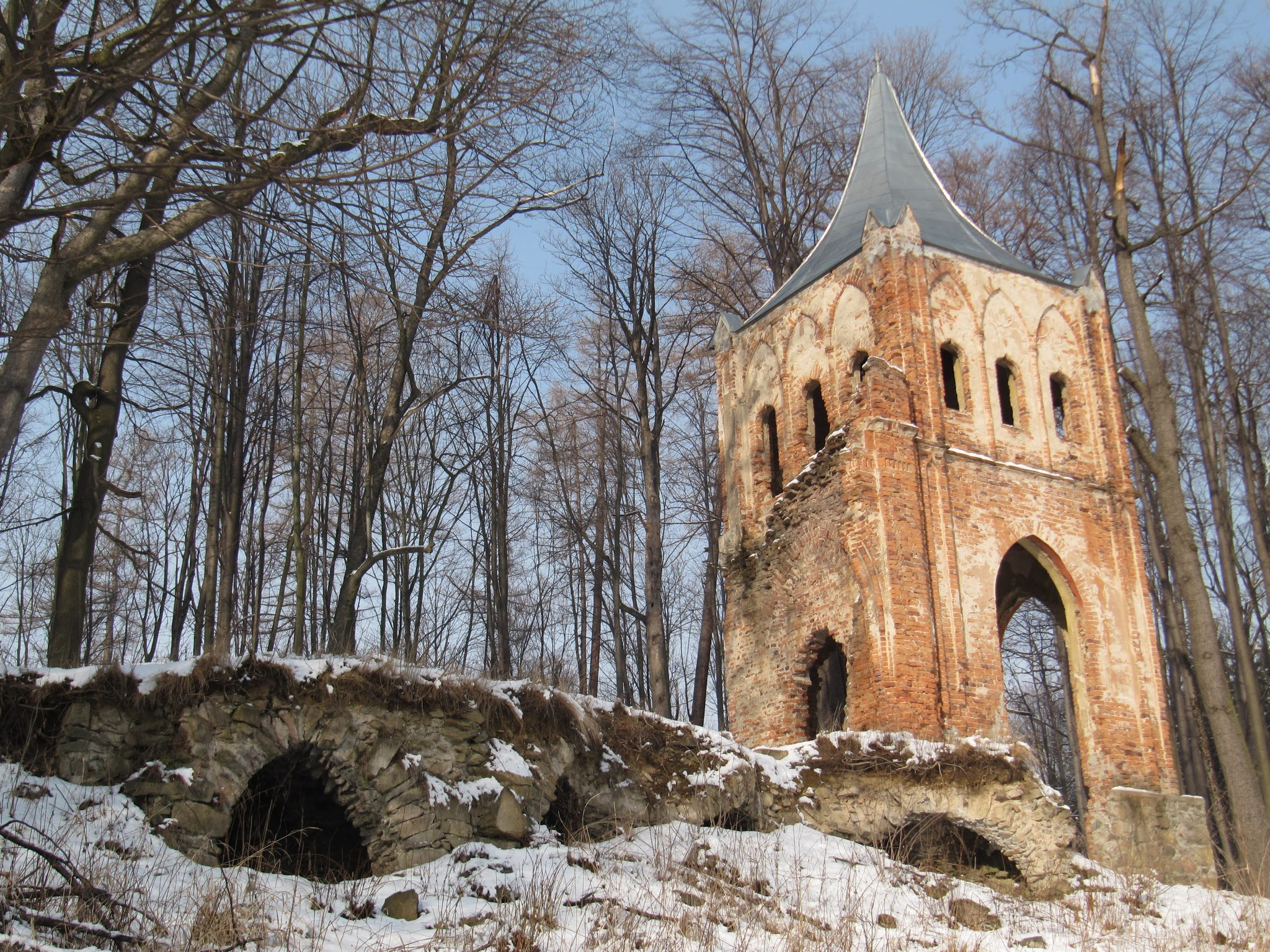 Ruiny Opactwa na zboczach Mrowca w Rudawach Janowickich w paśmie Wzgórz Karpnickich. "Ruiny Opactwa" w rzeczywistości były okazałą kaplicą grobową hrabiego Friedrich Wilhelm von Reden oraz Friederike Karoline von Reden.